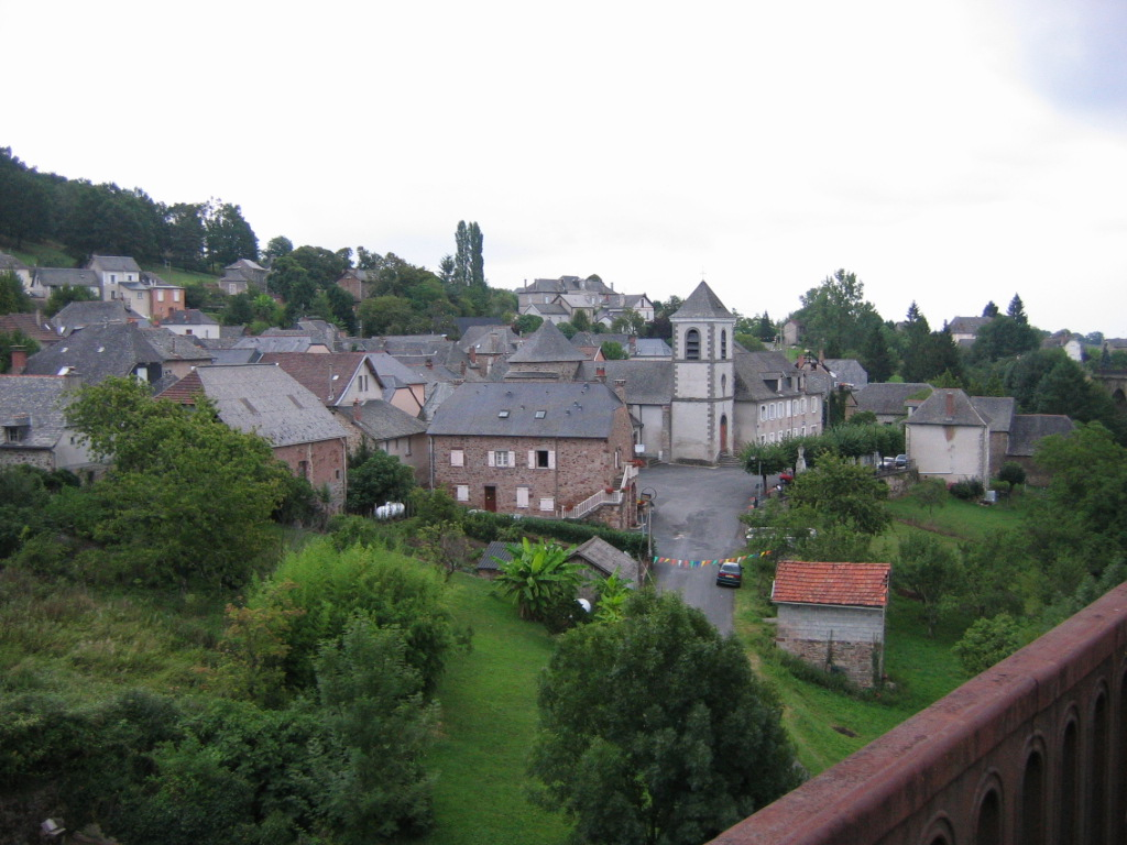 vue du village